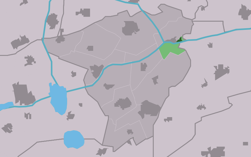 Kaartsje fan himrik fan Stroobos